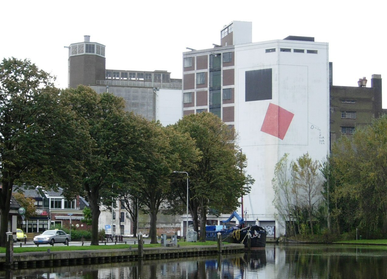 Meelfabriek, Leiden